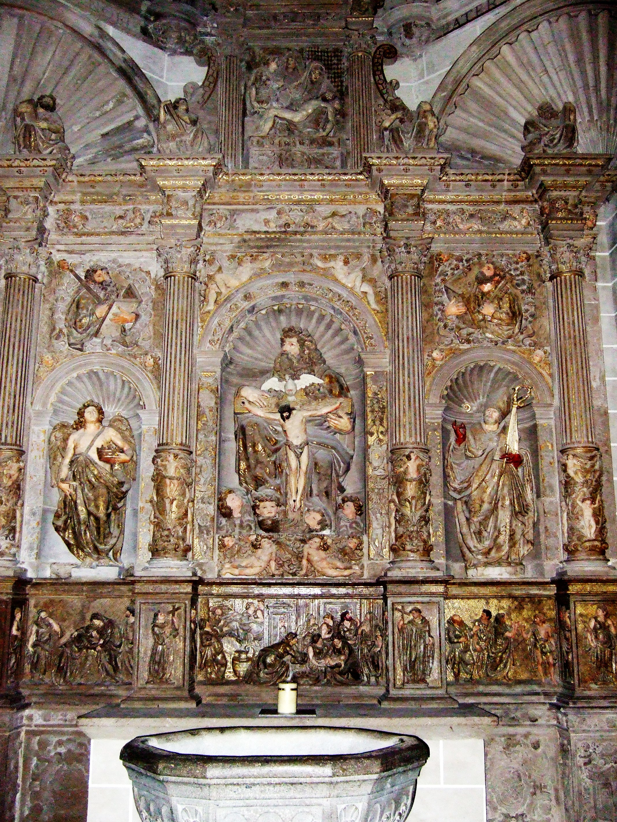 Jaca - Catedral - Interior - Retablo